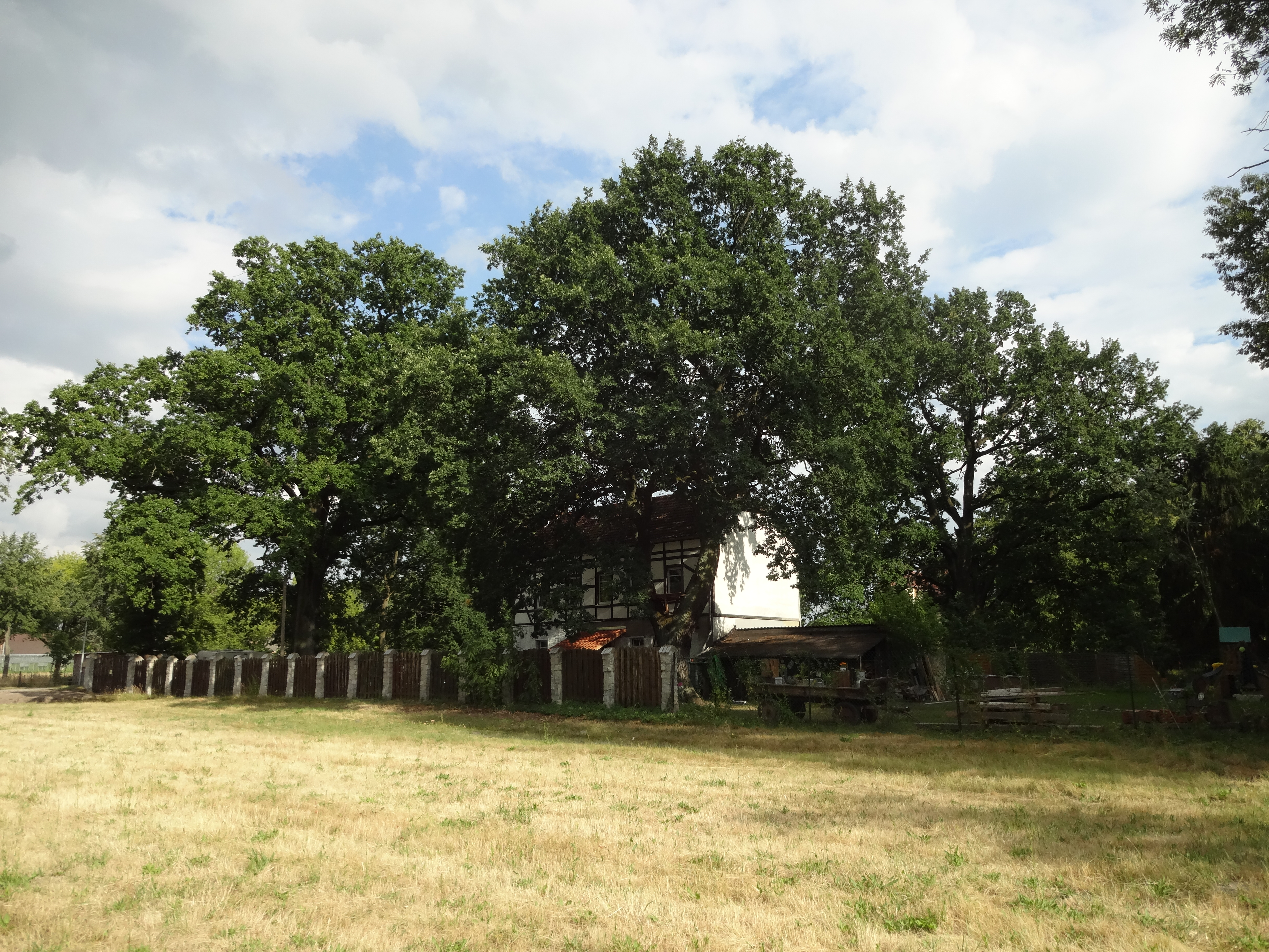 als Naturdenkmal geschützte Stieleiche in der Hauptstraße 27 in Lipten Baum nordwestlich des Gebäudes